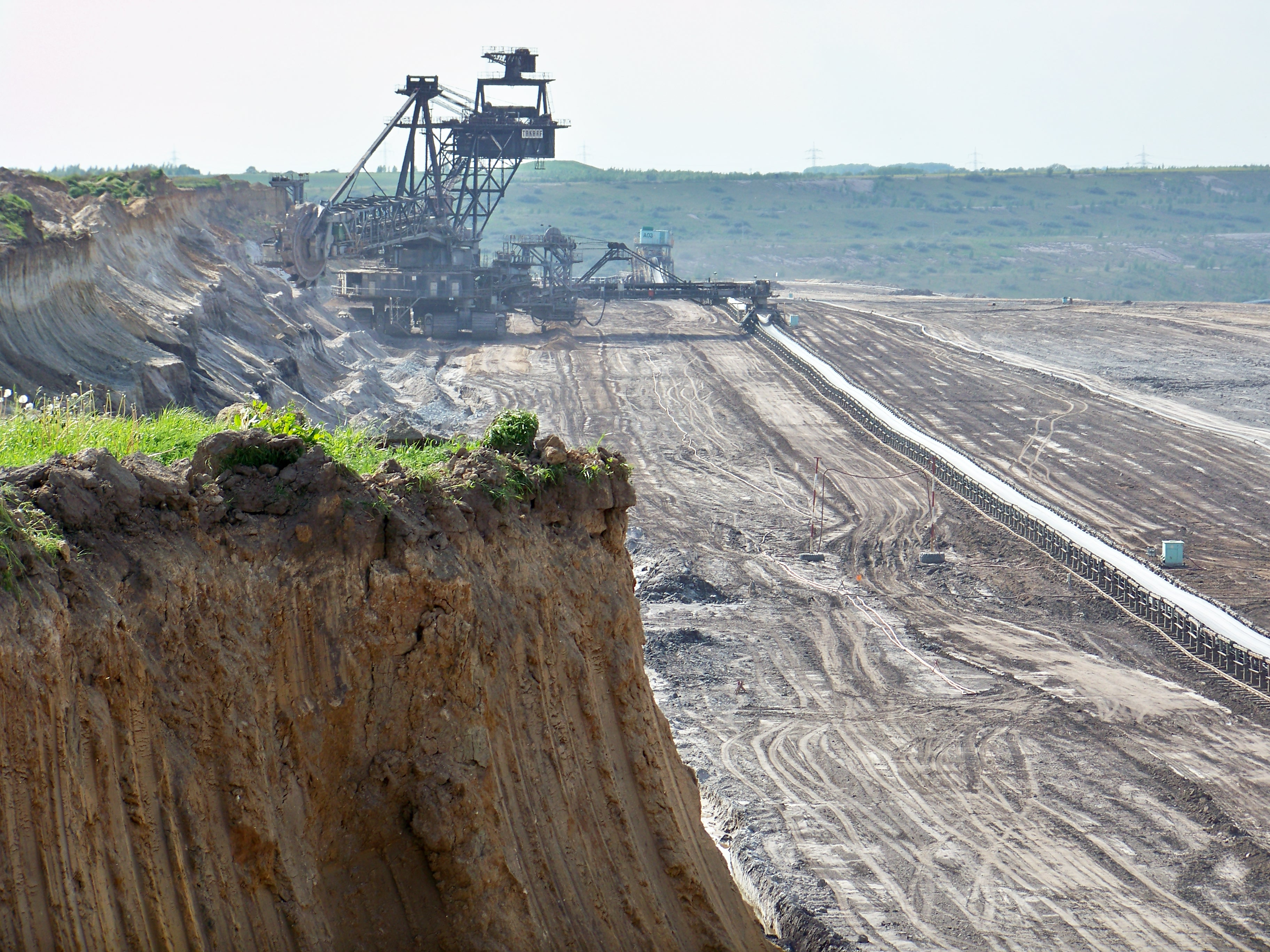 Der Braunkohlebagger im Tagebau Schleenhain bewegt sich Richtung Heuersdorf.